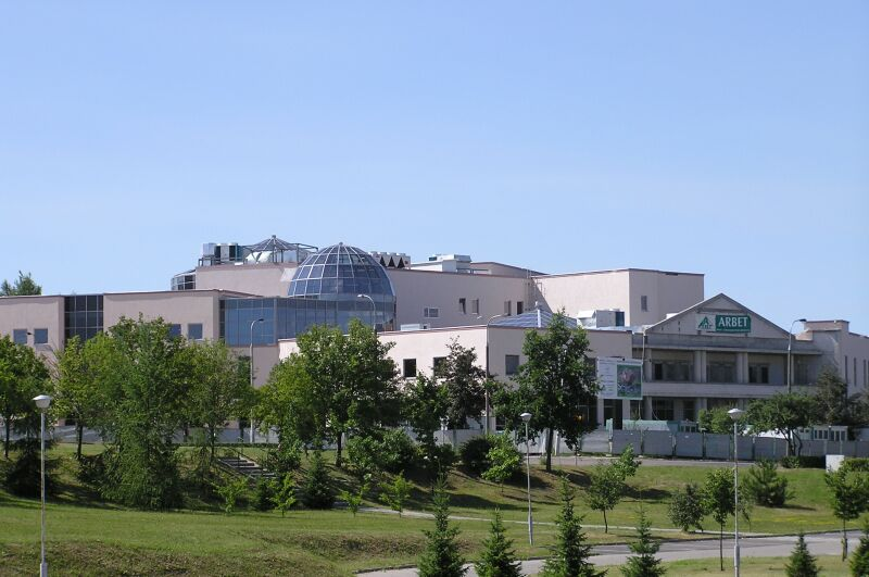 Uniwersytet Warmińsko-Mazurski w Olsztynie